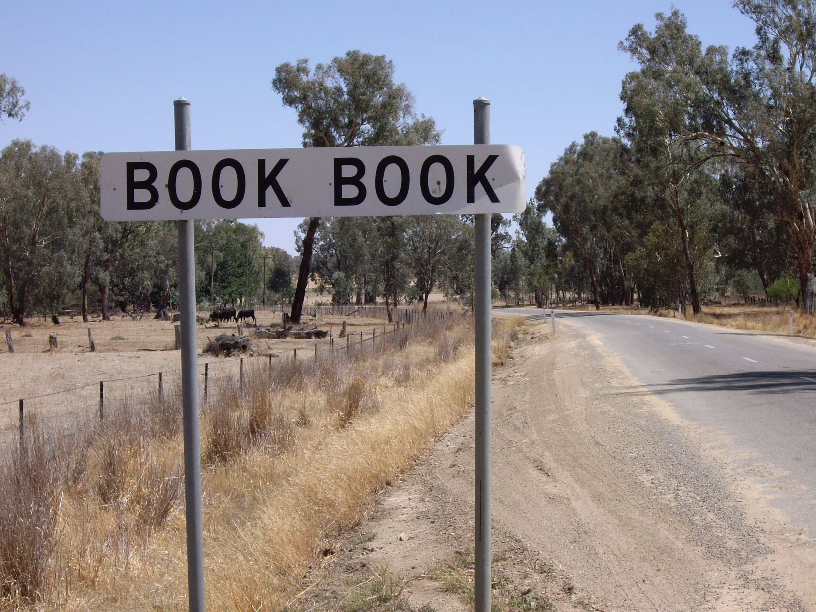 Book Book